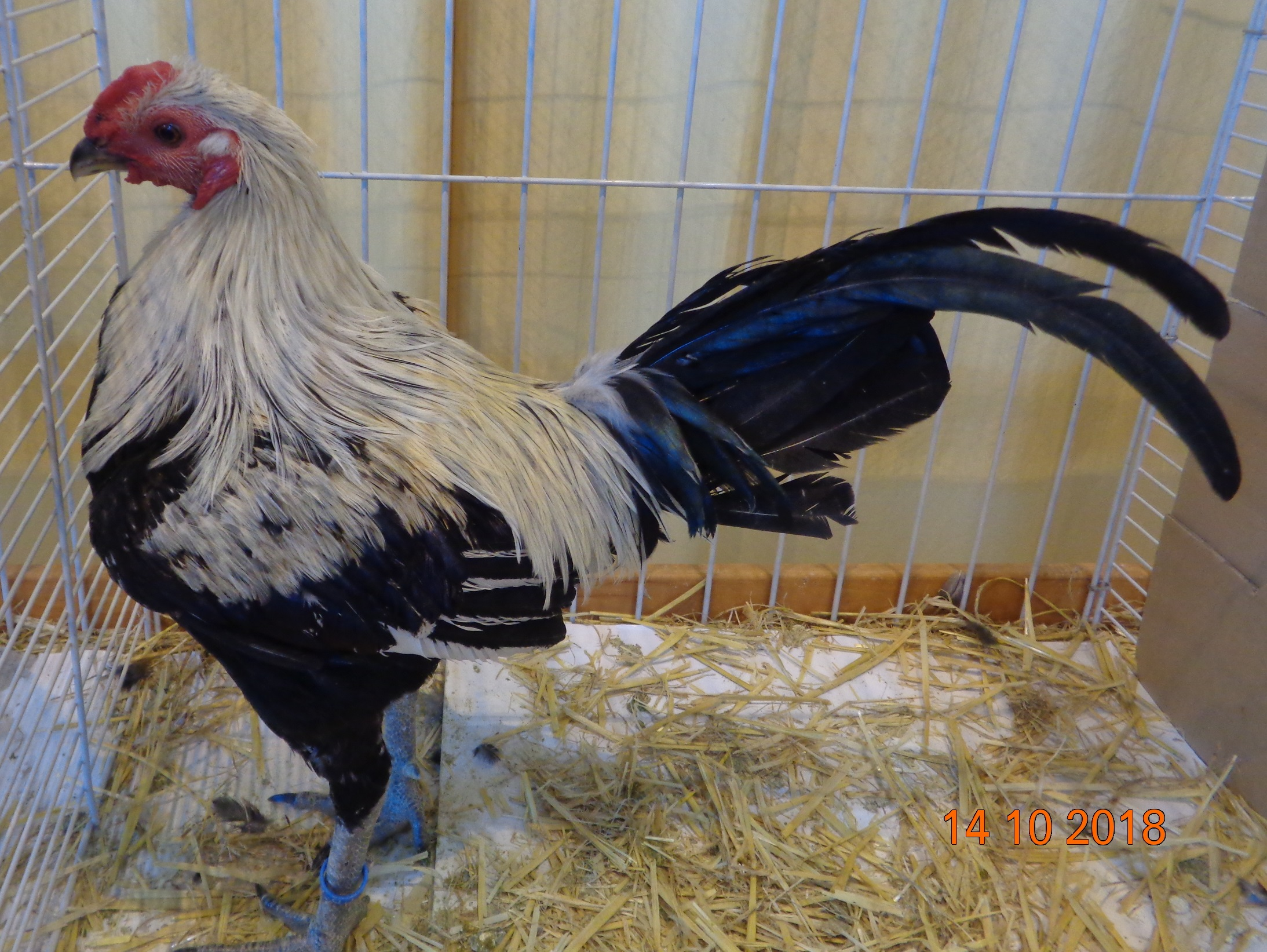 Coq de Combat